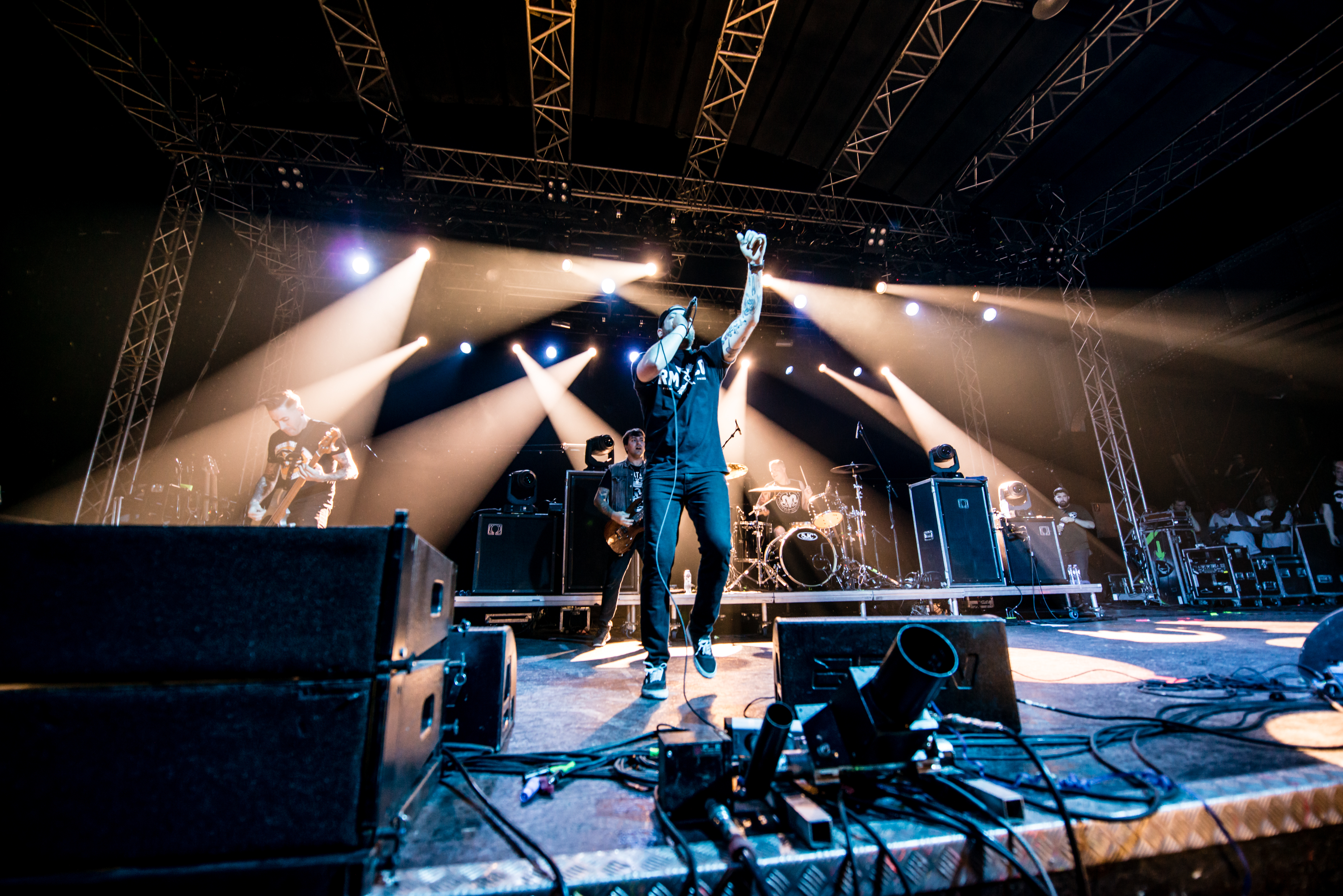 'Impericon Festival 2015; Oberhausen Turbinenhalle': 'The Ghost Inside'